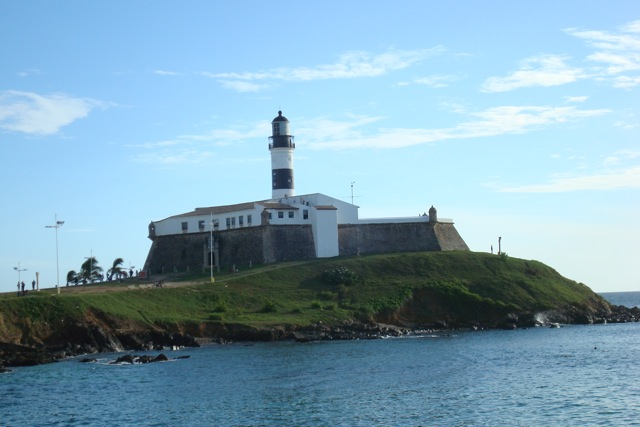 Barra Lighthouse